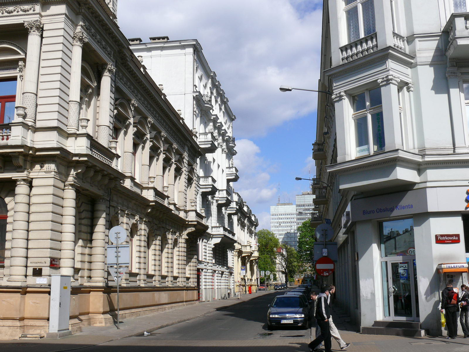 ulica Moniuszki w Łodzi